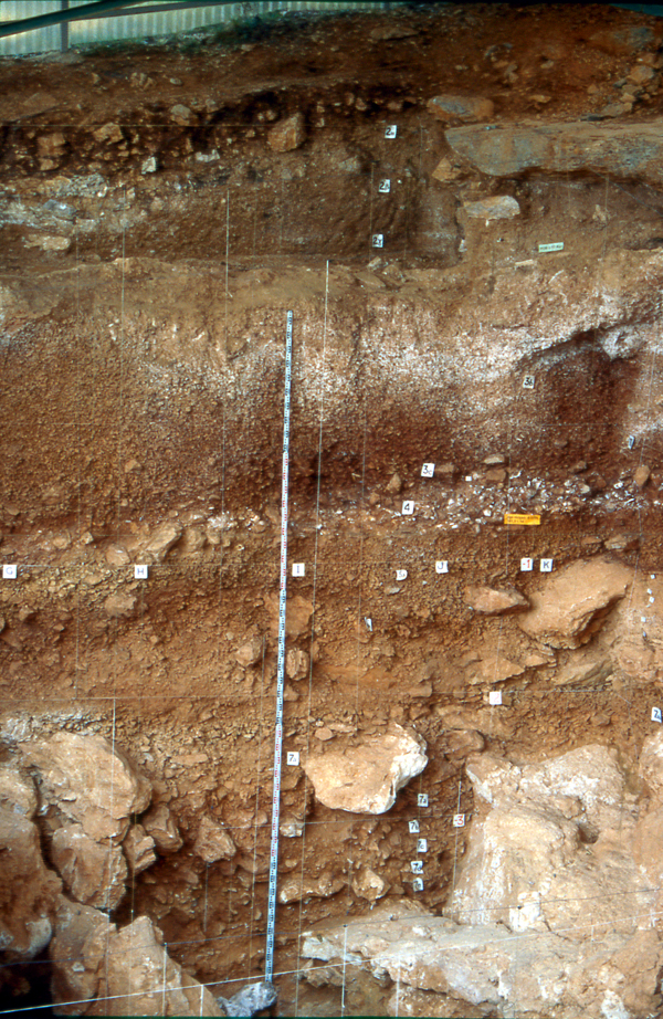 séquence stratigraphique du site préhistorique et paléontologique de Coudoulous I (Lot, France) (voir article Coudoulous sur wikipedia.fr) - photo personnelle V. Mourre